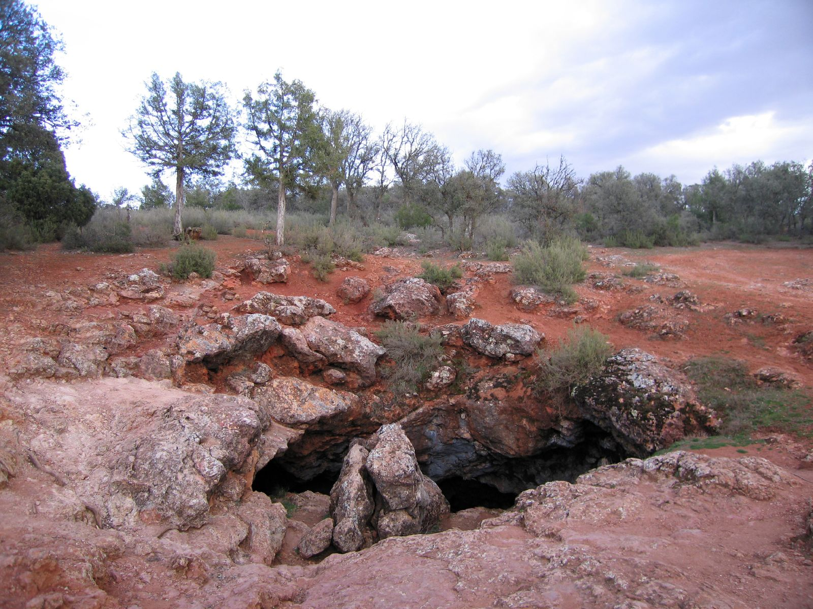 Cueva de Montesinos, Ciudad Real